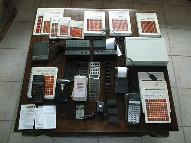 Thibaut Cousin